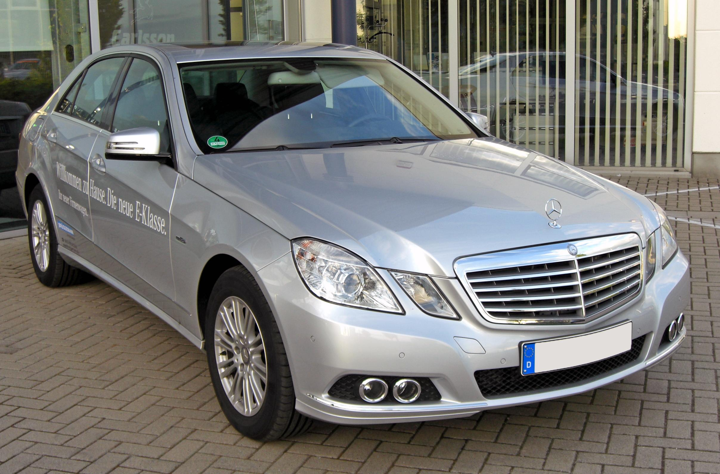 Mercedes W212